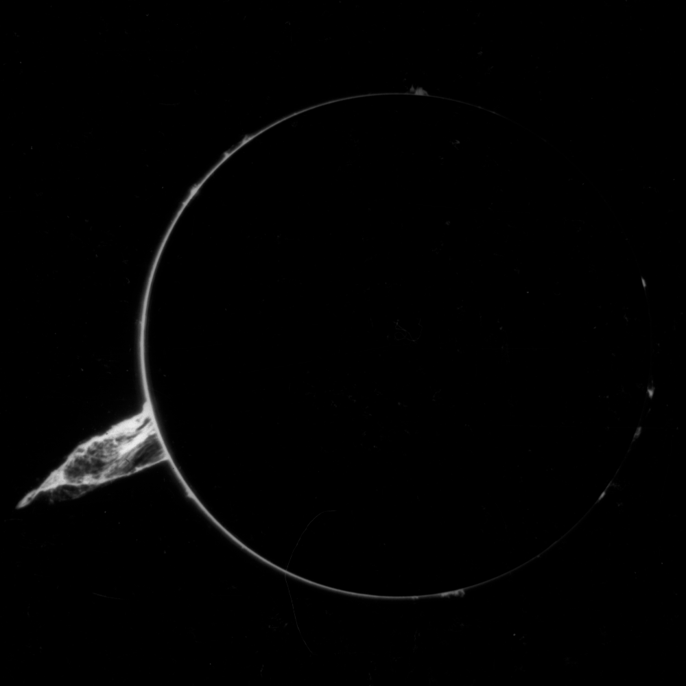 Protuberanzenaufnahme vom Observatorium Kanzelhöhe vom 11. Apr 1959, 9:18UT